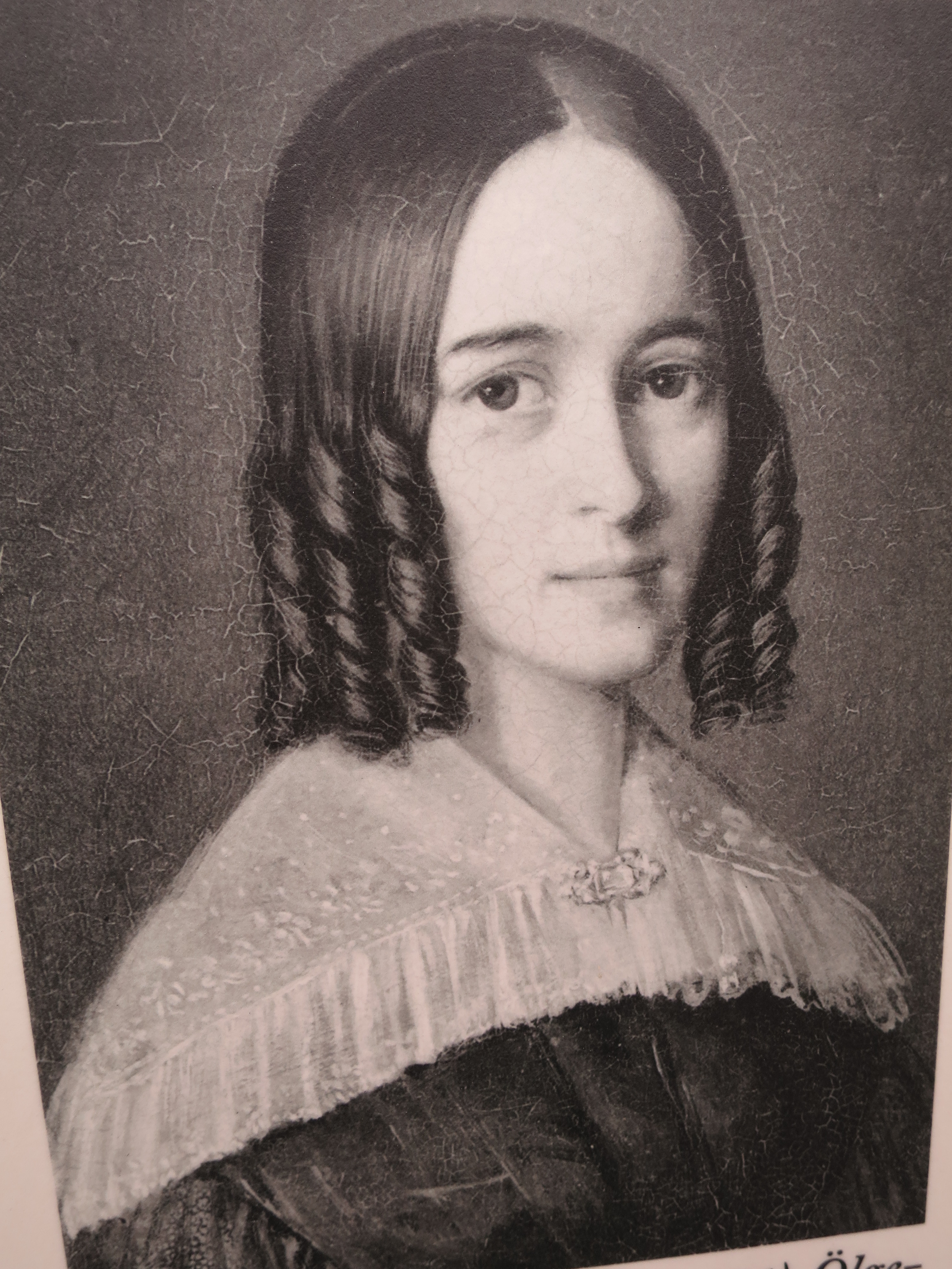 Abfotografierte Reproduktion: Marie Magdalene Elisabeth Hassenpflug (1788-1856) - "nach einem Ölgemälde von Ludwig Emil Grimm von 1812 im Besitz des Hanauer Geschichtsvereins" (inzwischen im Museum verzeichnet als "unbekannter Maler", siehe "andere Versionen")